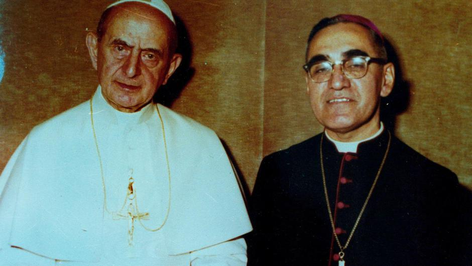 Monseñor Romero junto al papa Pablo VI. Aproximadamente un año antes de la muerte del pontífice.